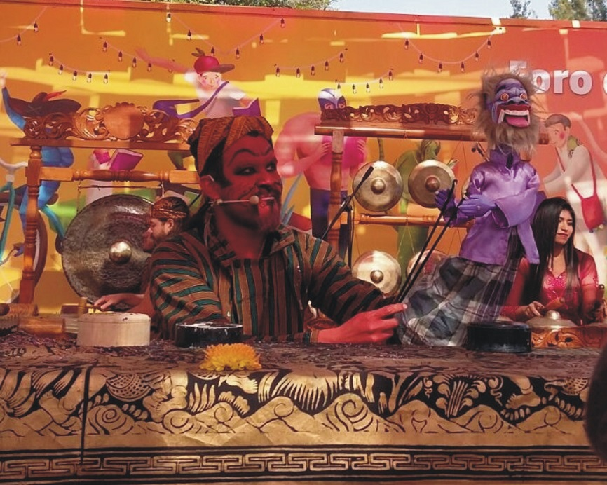 wayang golek del grupo Indra Swara, presentacion en la Feria Internacional del Libro Infantil y Juvenil FILIJ 2017